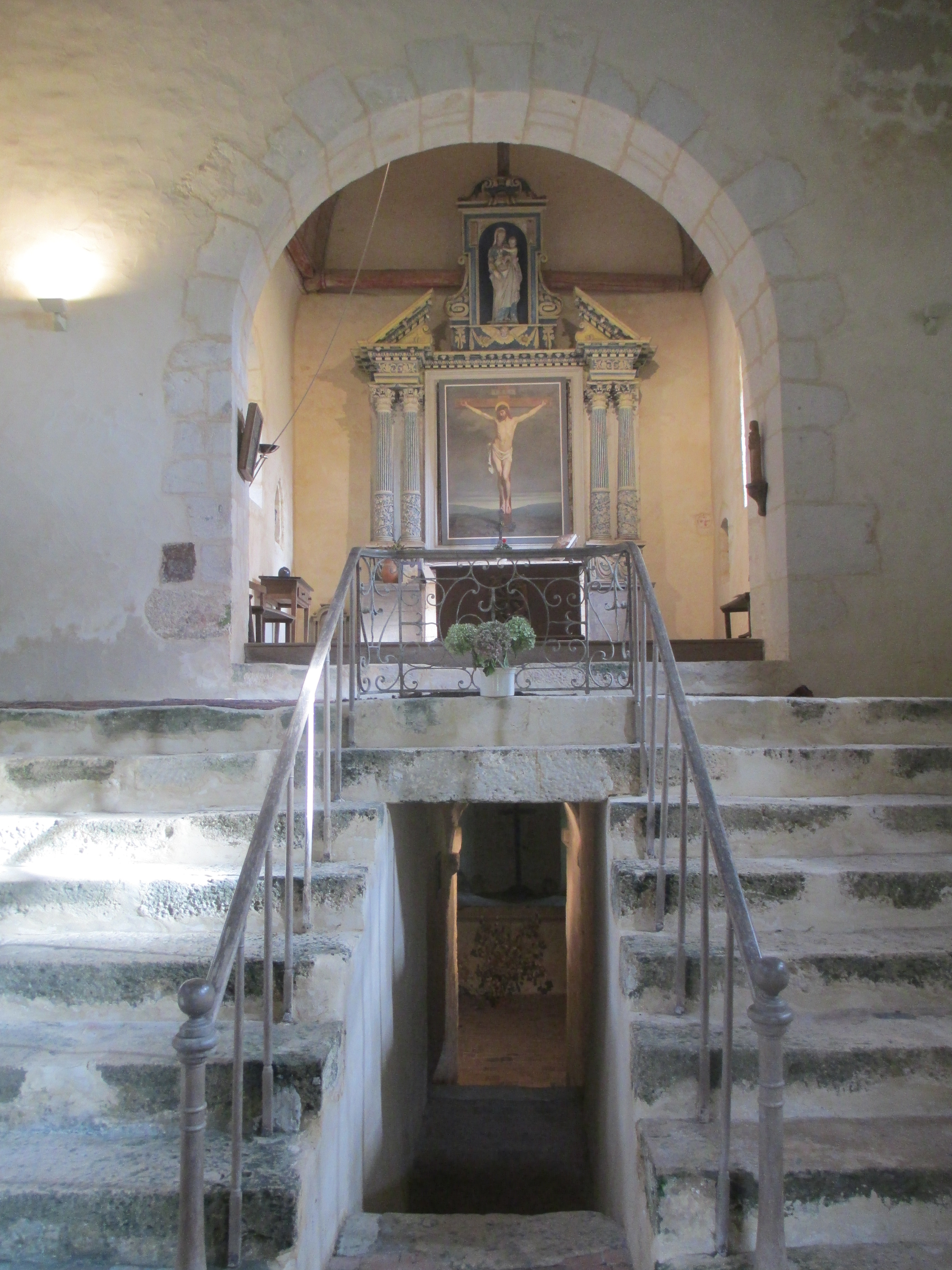 Nef et chœur de la chapelle Saint-Santin de Bellême, dans l'Orne.